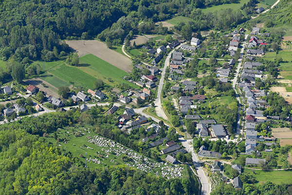 Jásd, légi fotó